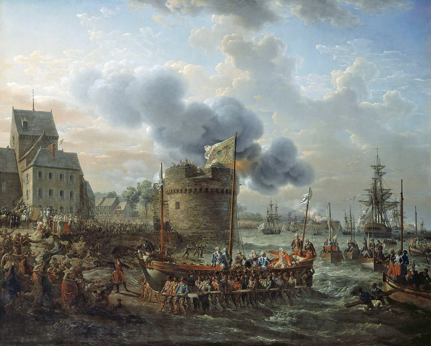 Visite de Louis XVI à Cherbourg en juin 1786, à l'occasion des travaux pour mettre en place la digue. Dimensions : 180 x 223 cm. Matière et technique : huile sur toile.